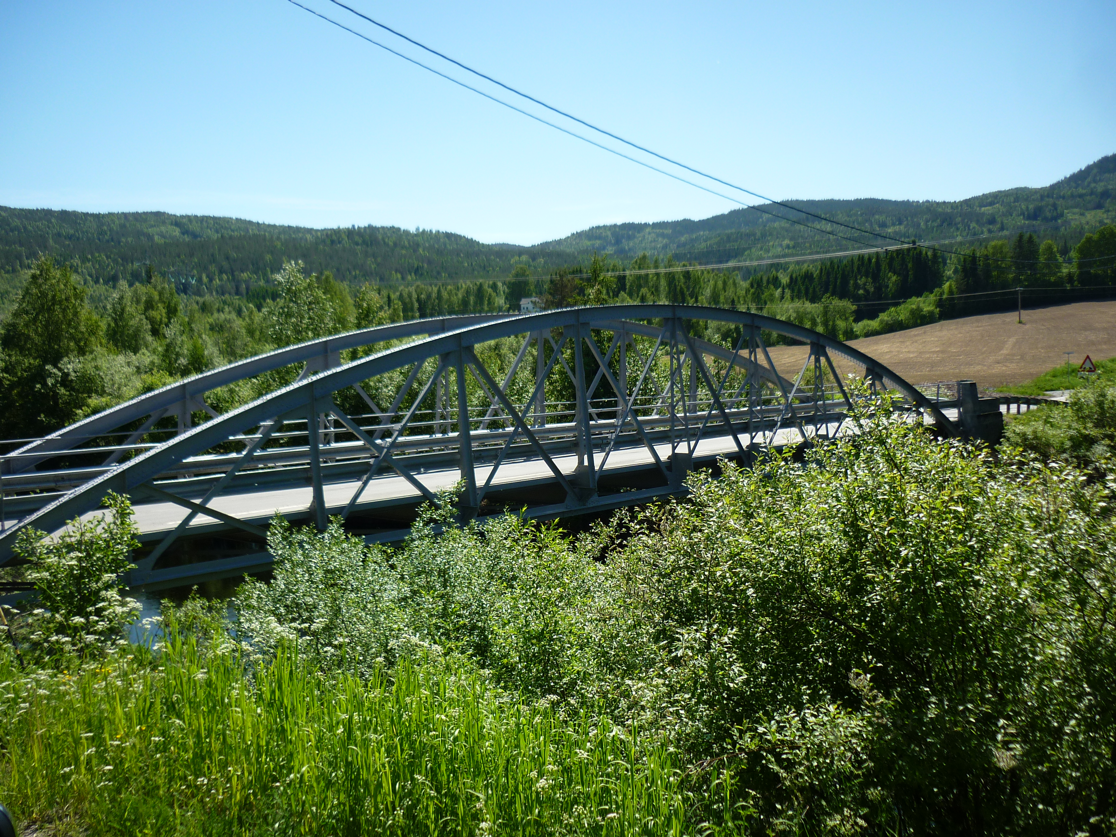 Bårnås bru over Sogna i Soknedalen